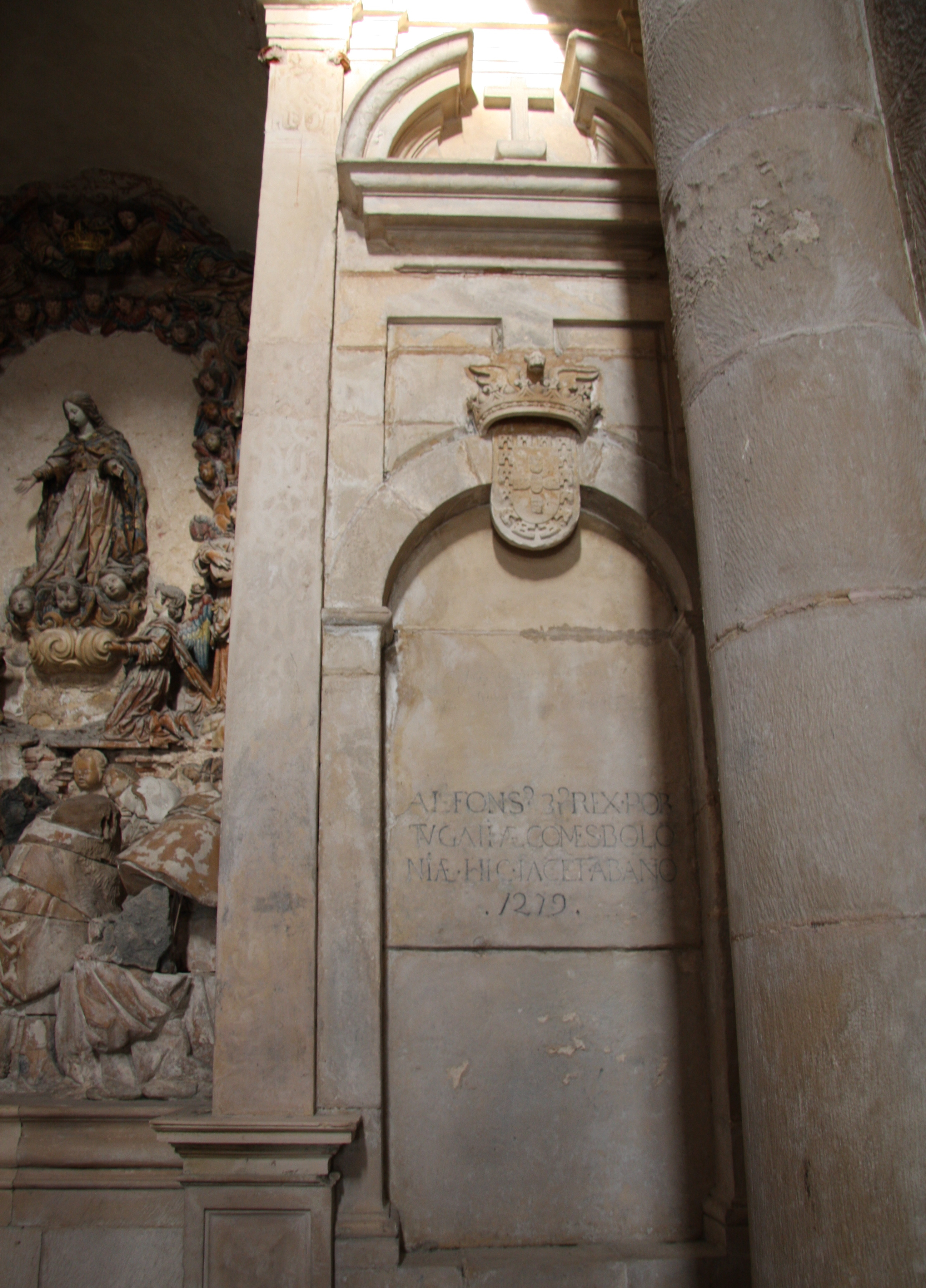 Mosteiro de Santa Maria de Alcobaça